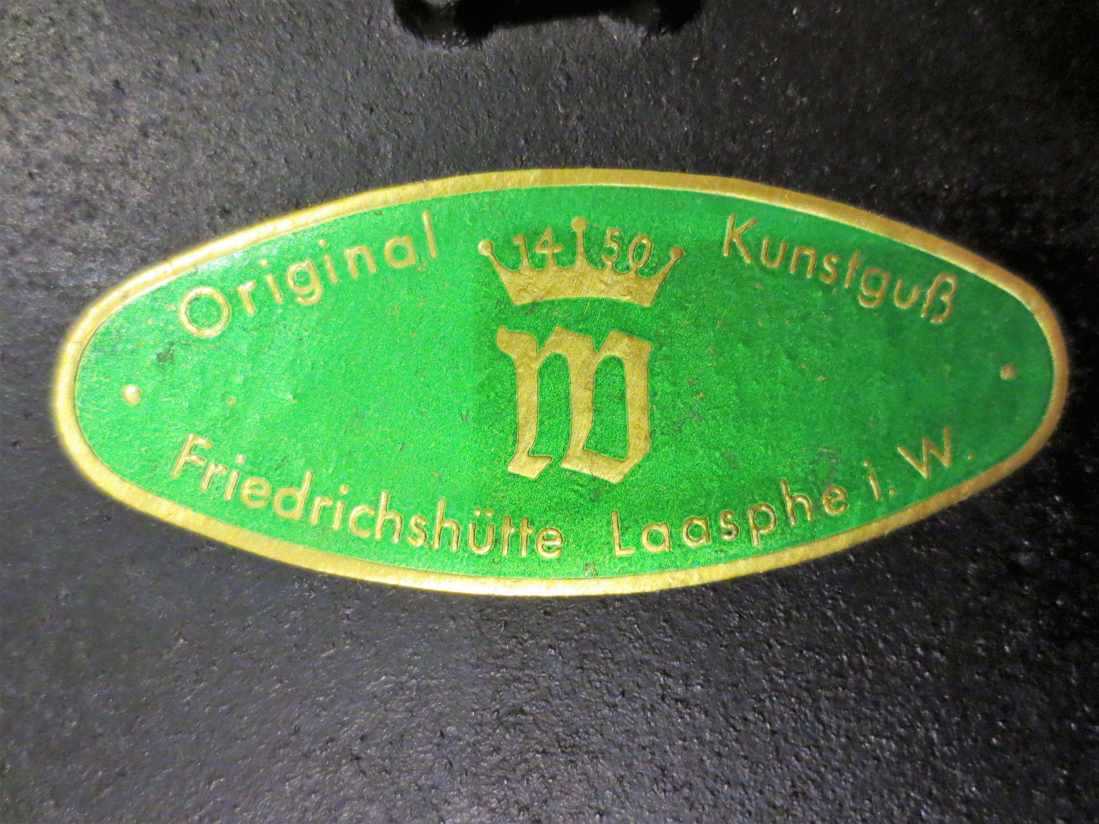 Beispiel für Kunstgussfertigung der Friedrichshütte.